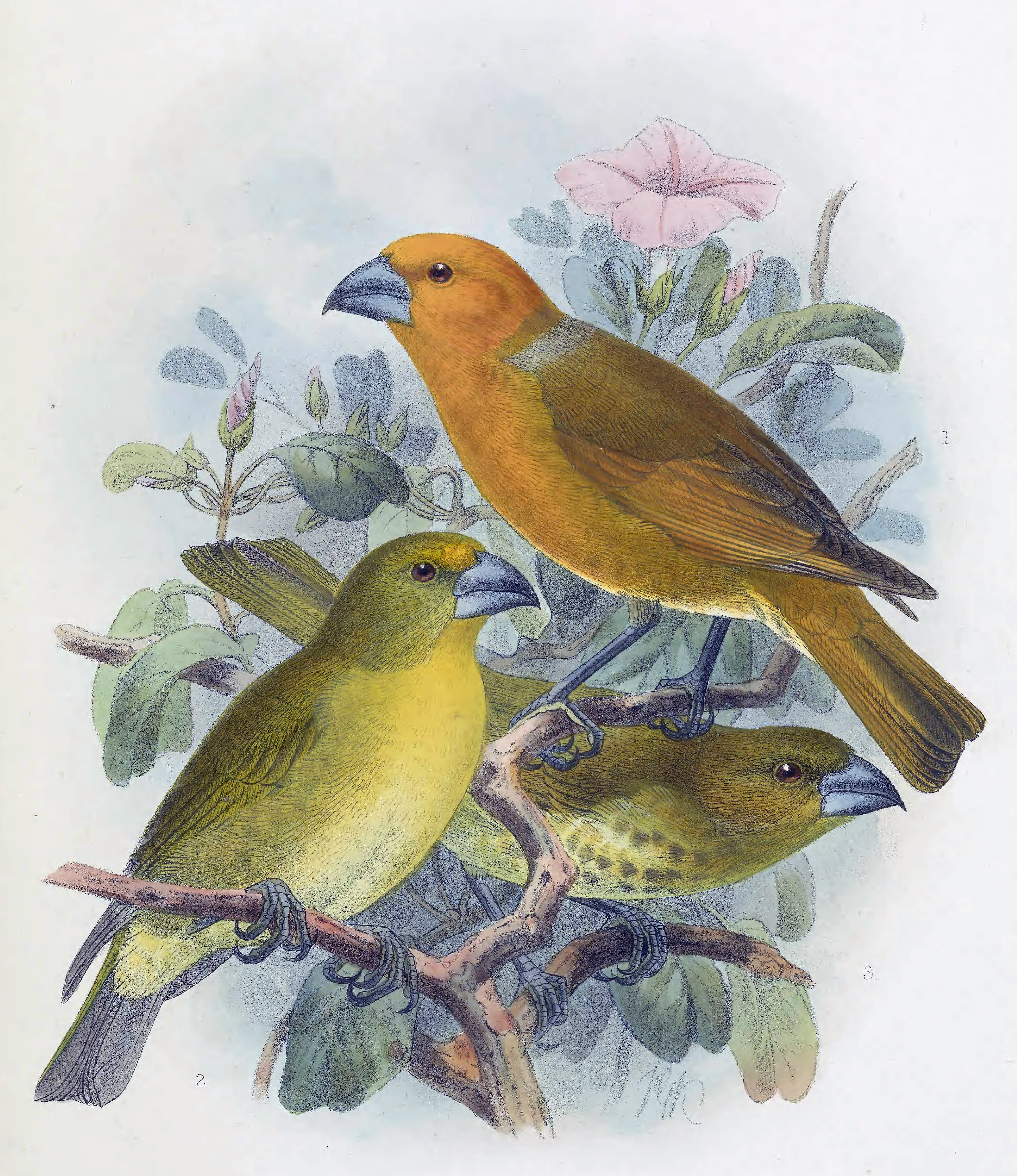 Rhodacanthis palmeri (Original description: Telespiza palmeri)